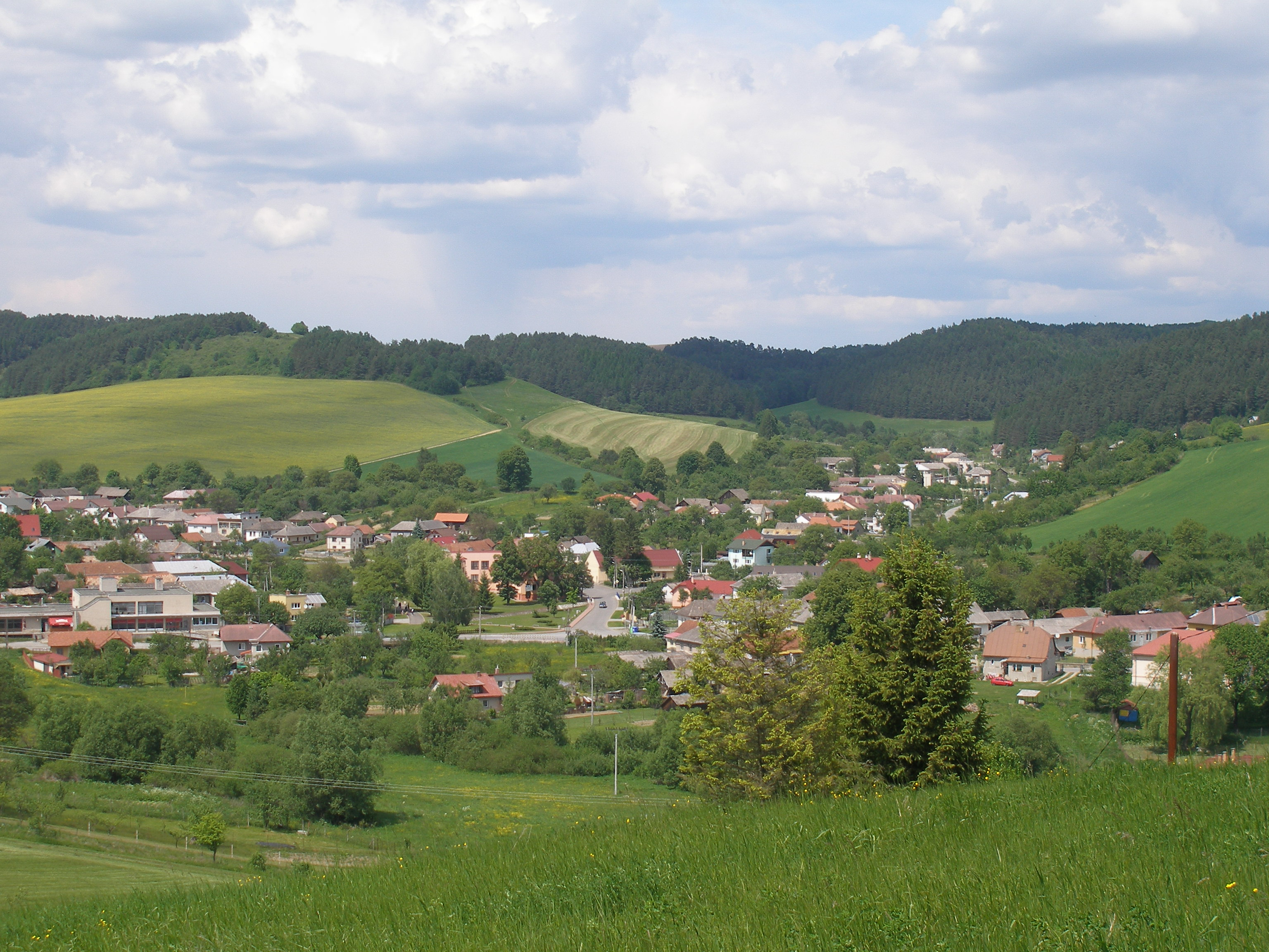 Obec Sedlice, pohľad z kopca Skalka.